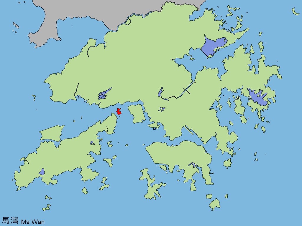 中文（香港）: 馬灣。